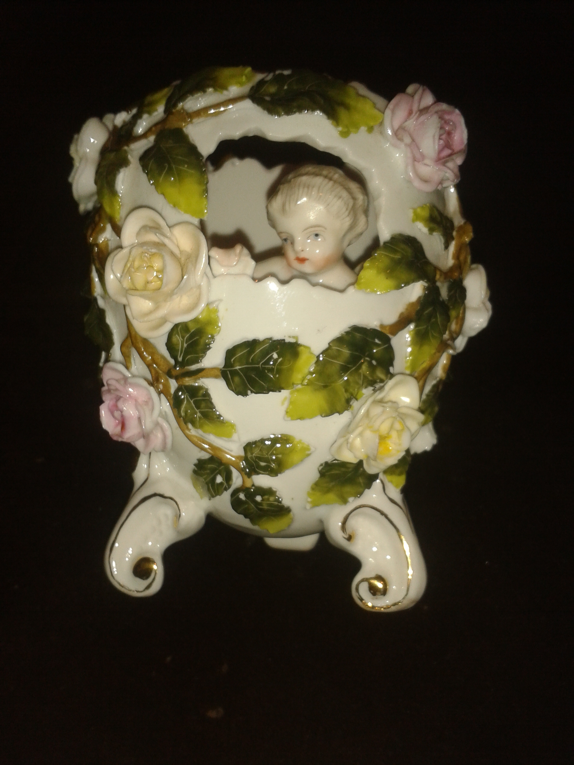 Florero con pie de trípode en porcelana de Meissen. S XVIII. Un angelito de bulto redondo, con alas, en el interior del florero se asoma por un hueco perforado a modo de ventana a una especie de jardín formado por ramas con rosas realizadas en relieve que simulan trepar por la pared.